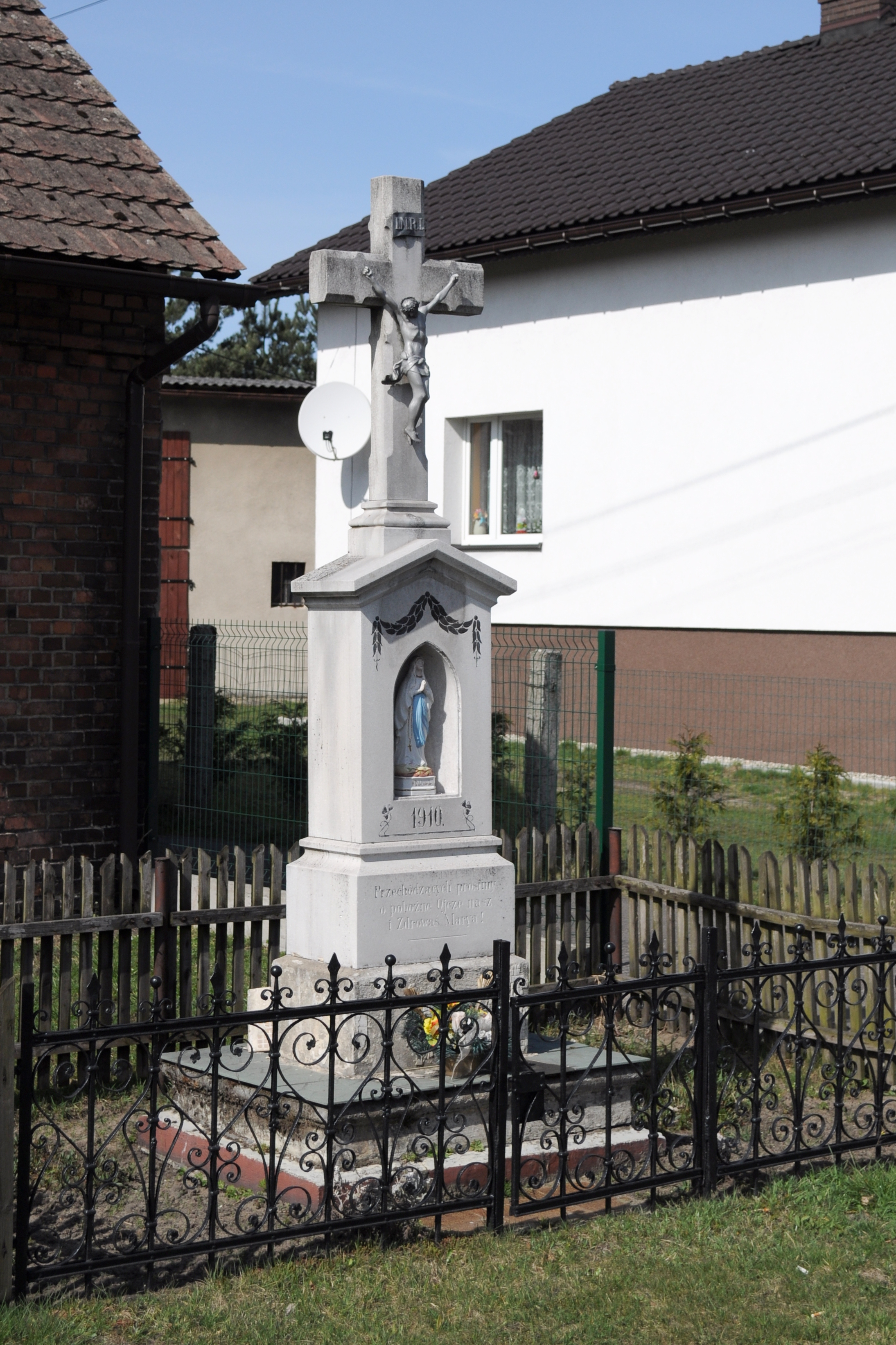 Bargłówka.